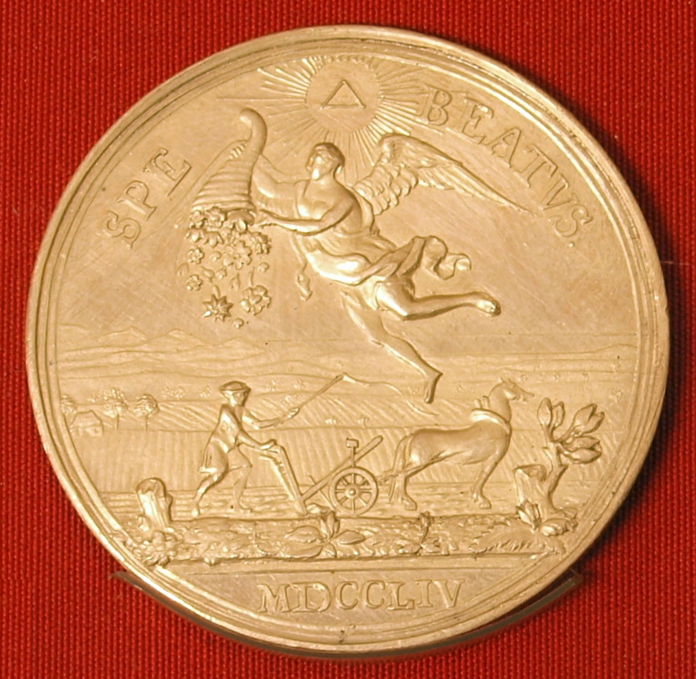 Aanvang van het jaar 1754